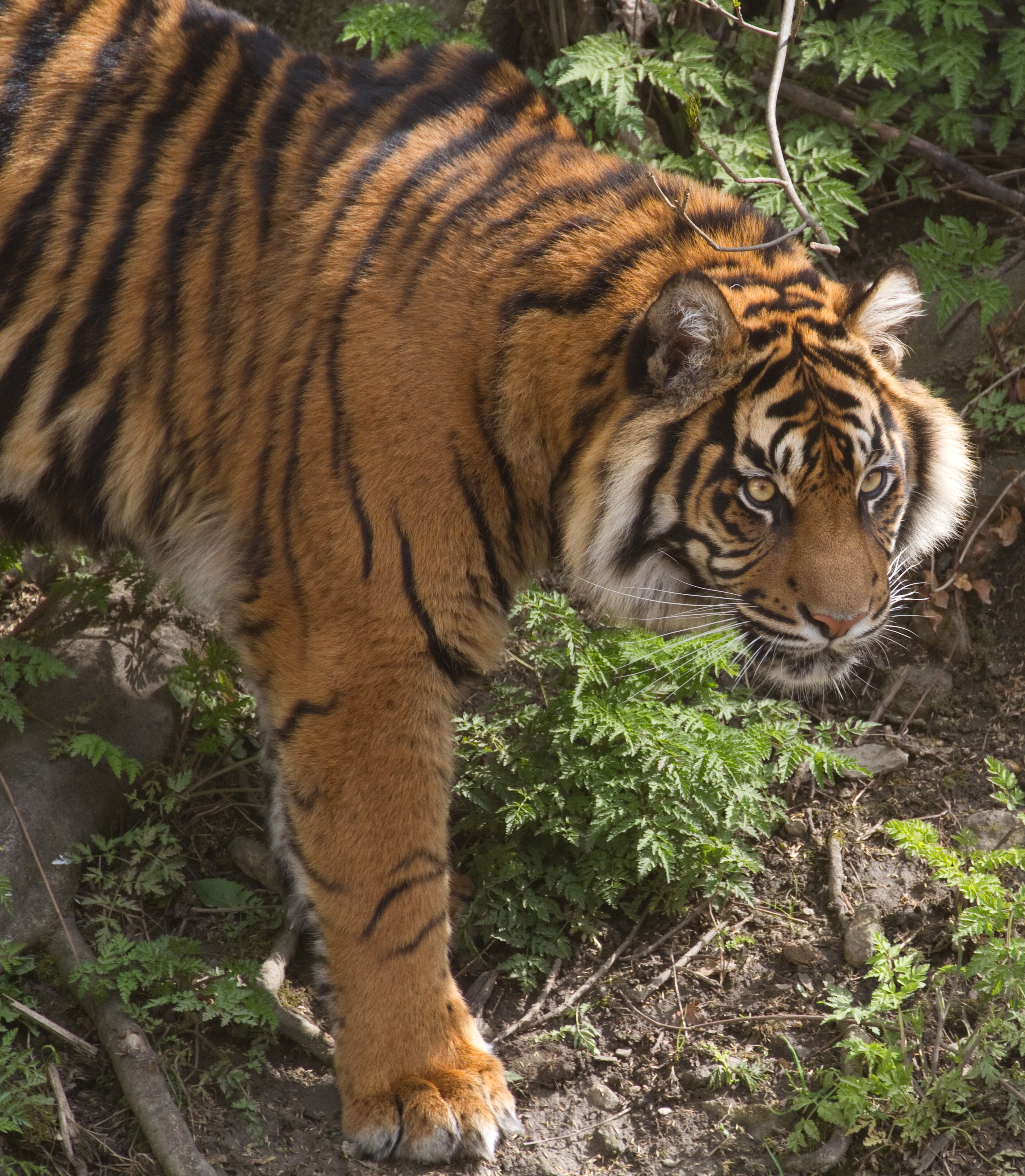 Sumatran Tiger 6